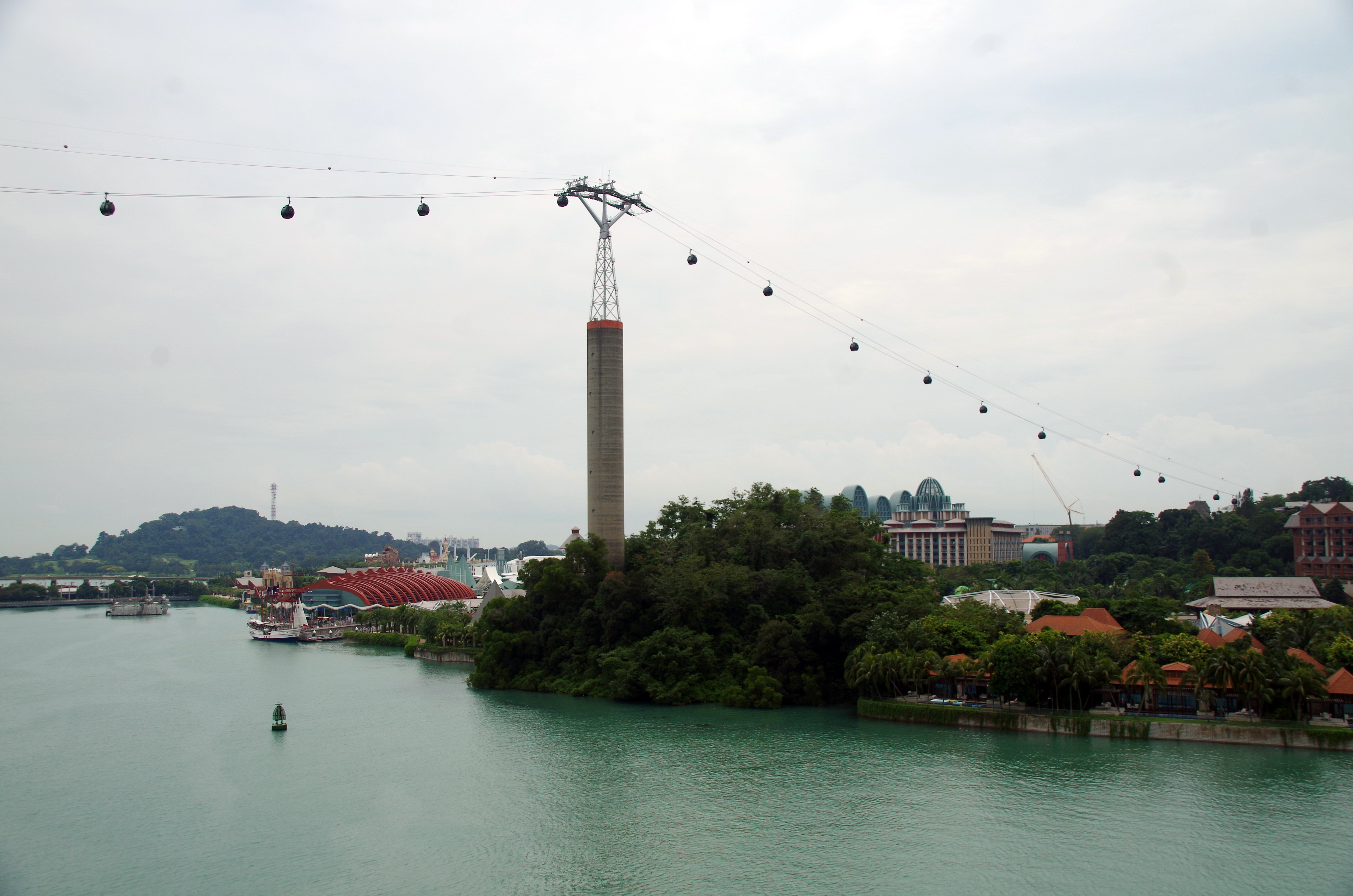 Cable Car zur Insel Sentosa